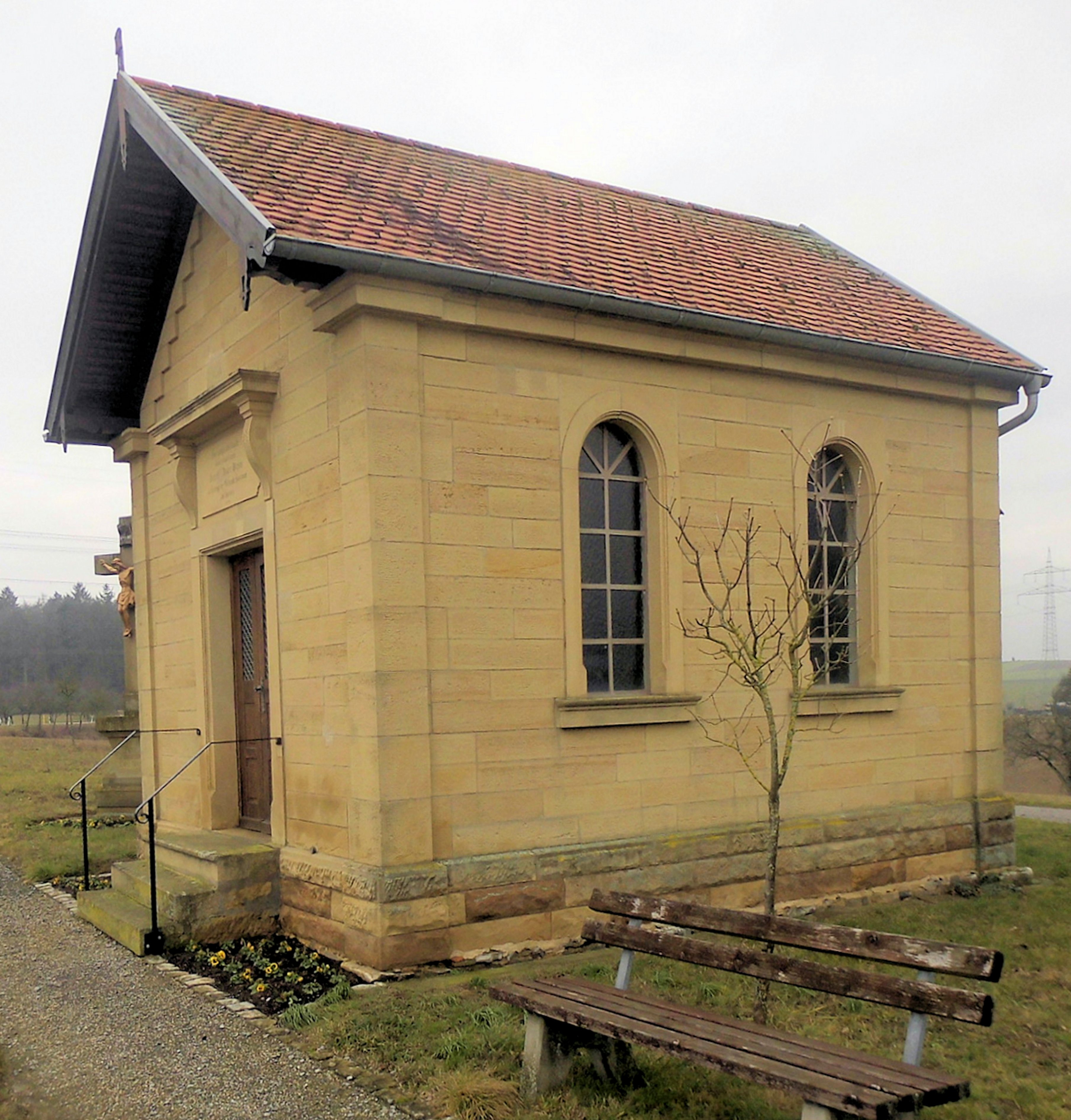 Kapelle an der Straße nach Büchig in Bauerbach, Stadt Bretten, Landkreis Karlsruhe